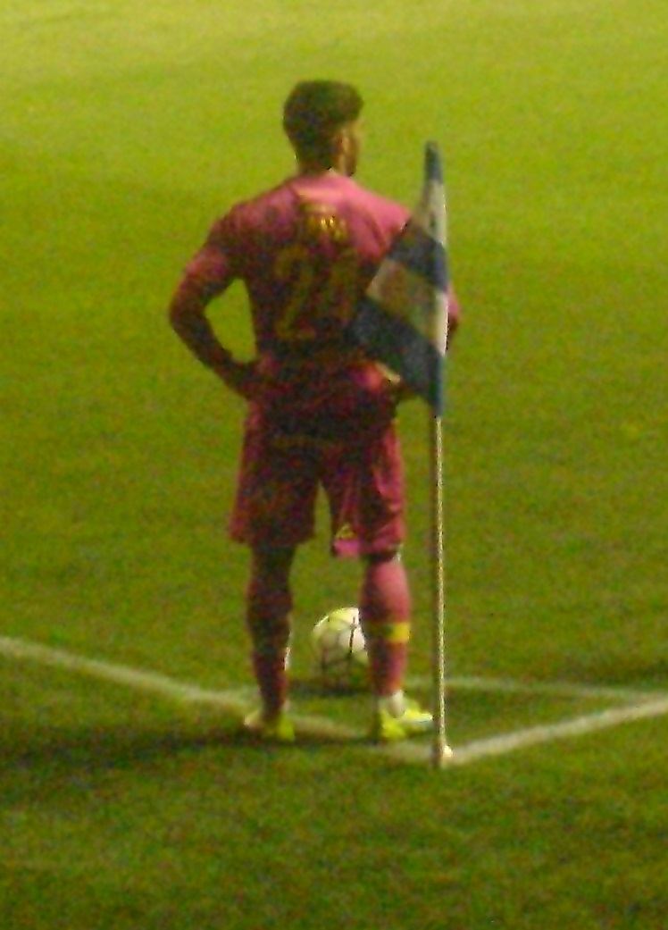 Tana, jugador del Las Palmas.